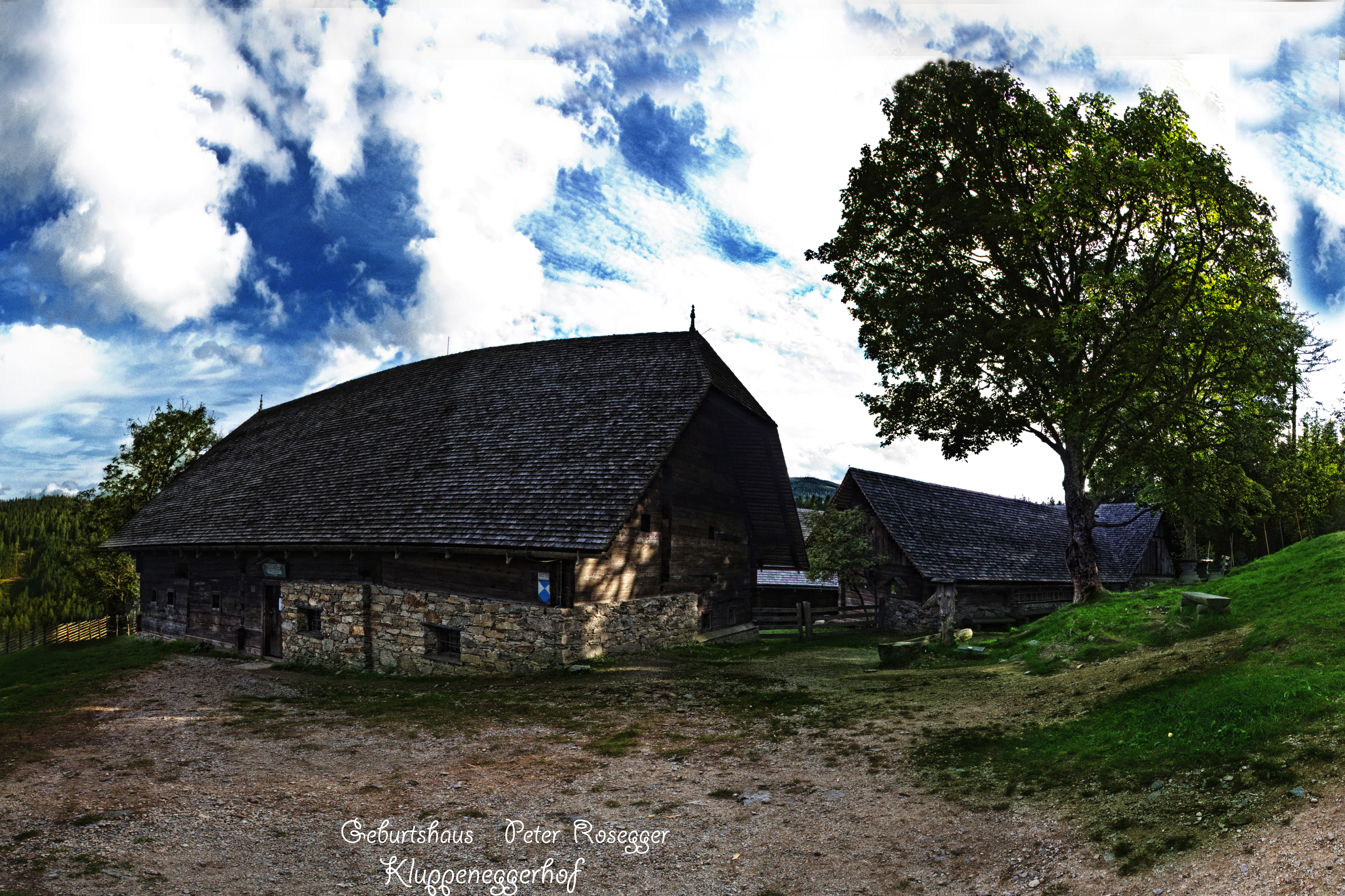 Peter Rosegger Geburtshaus